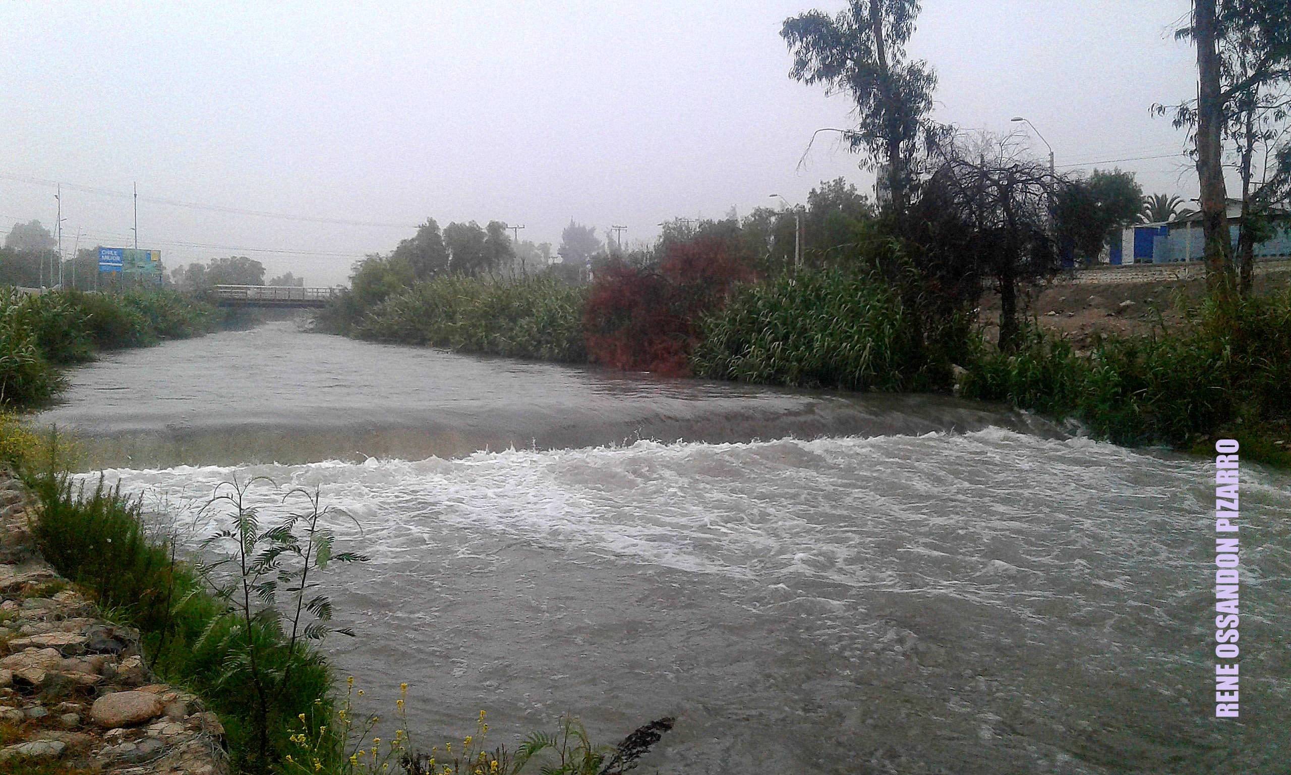 Ubicado en la III región de Atacama Chile.